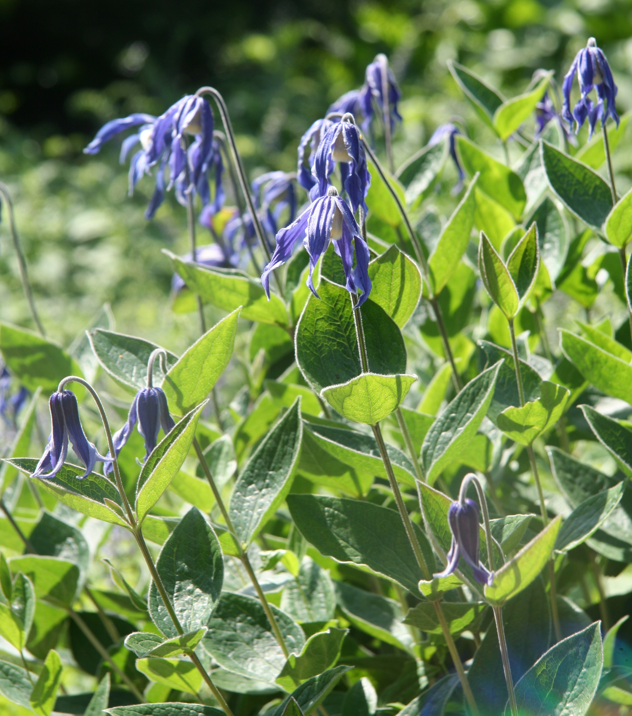 Clematis integrifolia im Botanischen Garten Dresden